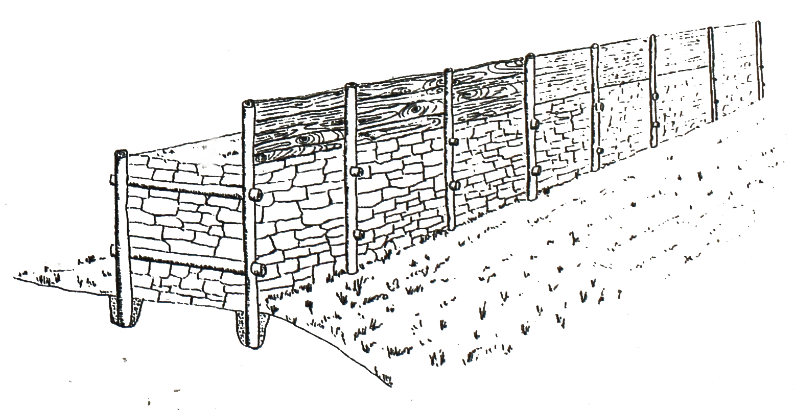 Ausschnitt über die Steinmauer aus dem 5. Jhd. v. Chr. auf der Informationstafel über den Kordigast und das sich dort befindende keltische Hügelgrab auf dem "Kordigast". Anders als bei der ursprünglichen Mauer beträgt in dieser Zeichnung die Mauerbreite nur 2,5m. Fotograf: Trollhead